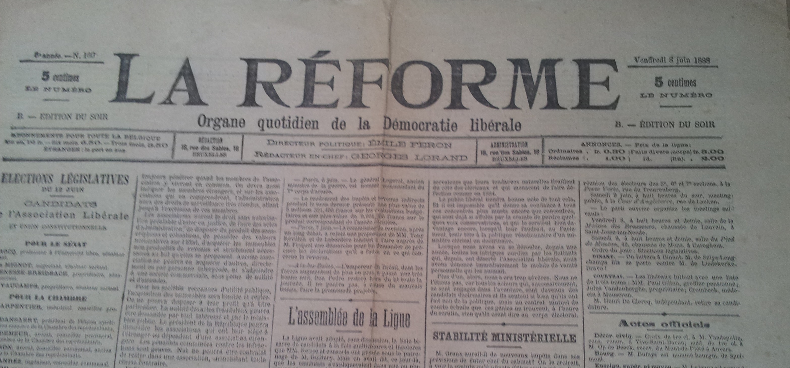 En-tête du journal quotidien La Réforme du 18 juin 1888